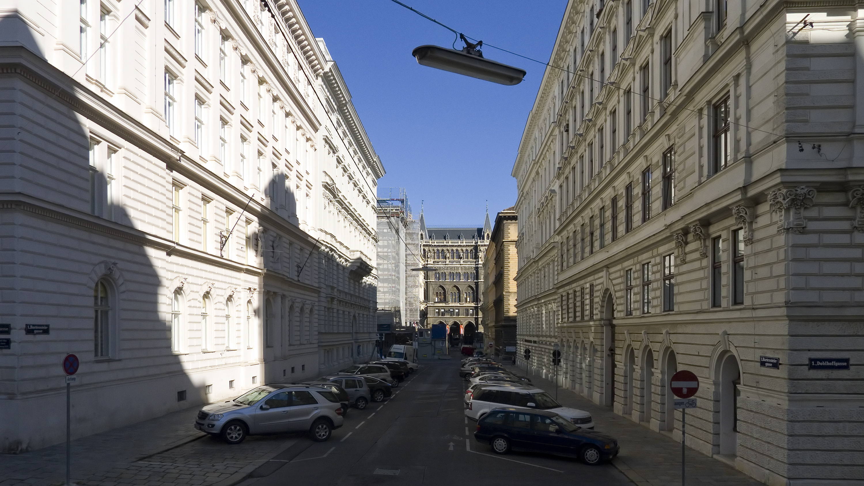 Bartensteingasse in Wien 1 bei der Doblhoffgasse Richtung Norden